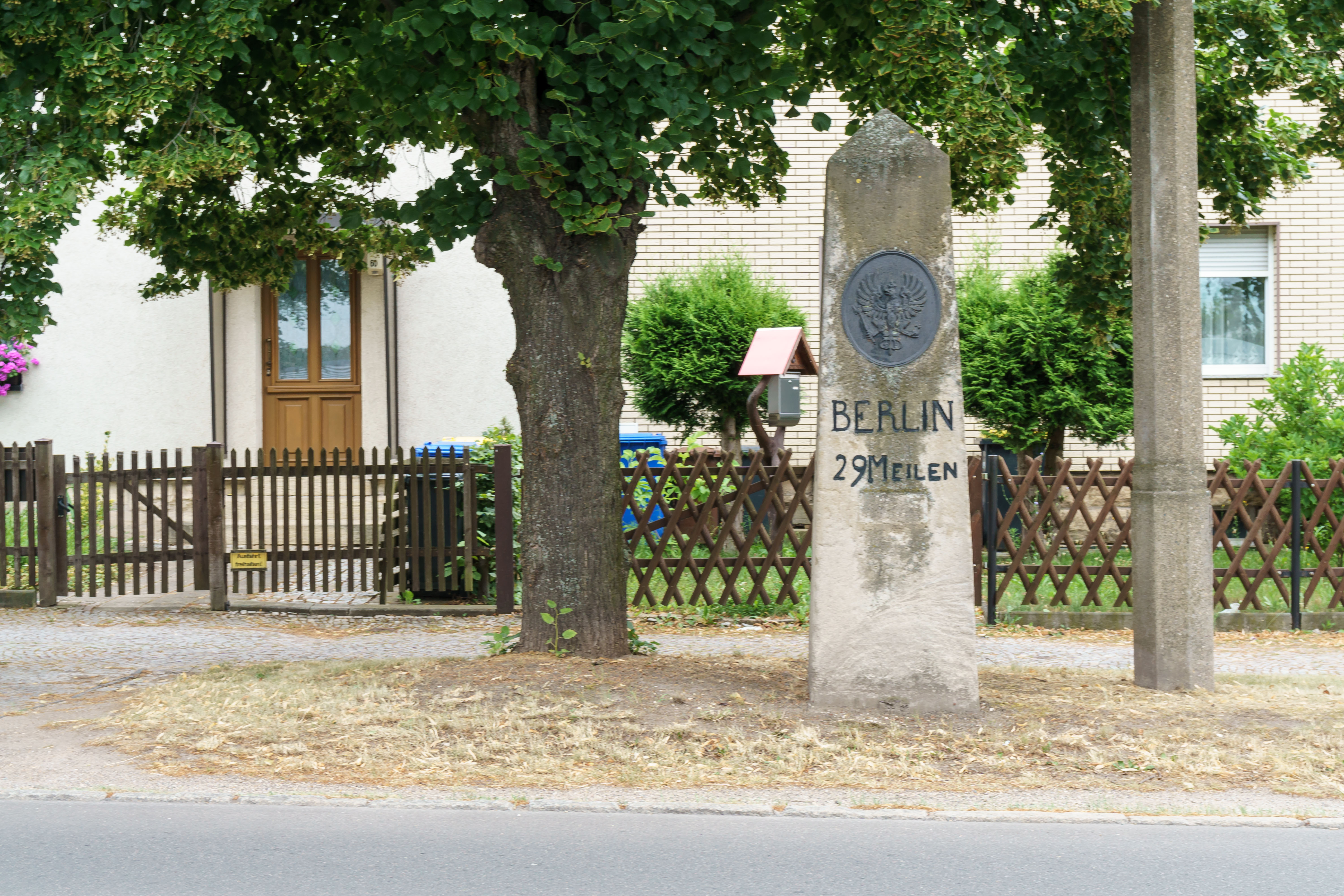 Preußischer Ganzmeilenobelisk (0830) in Zeitz Inschrift: Berlin 29 Meilen ; Weissenfels 2 Meilen